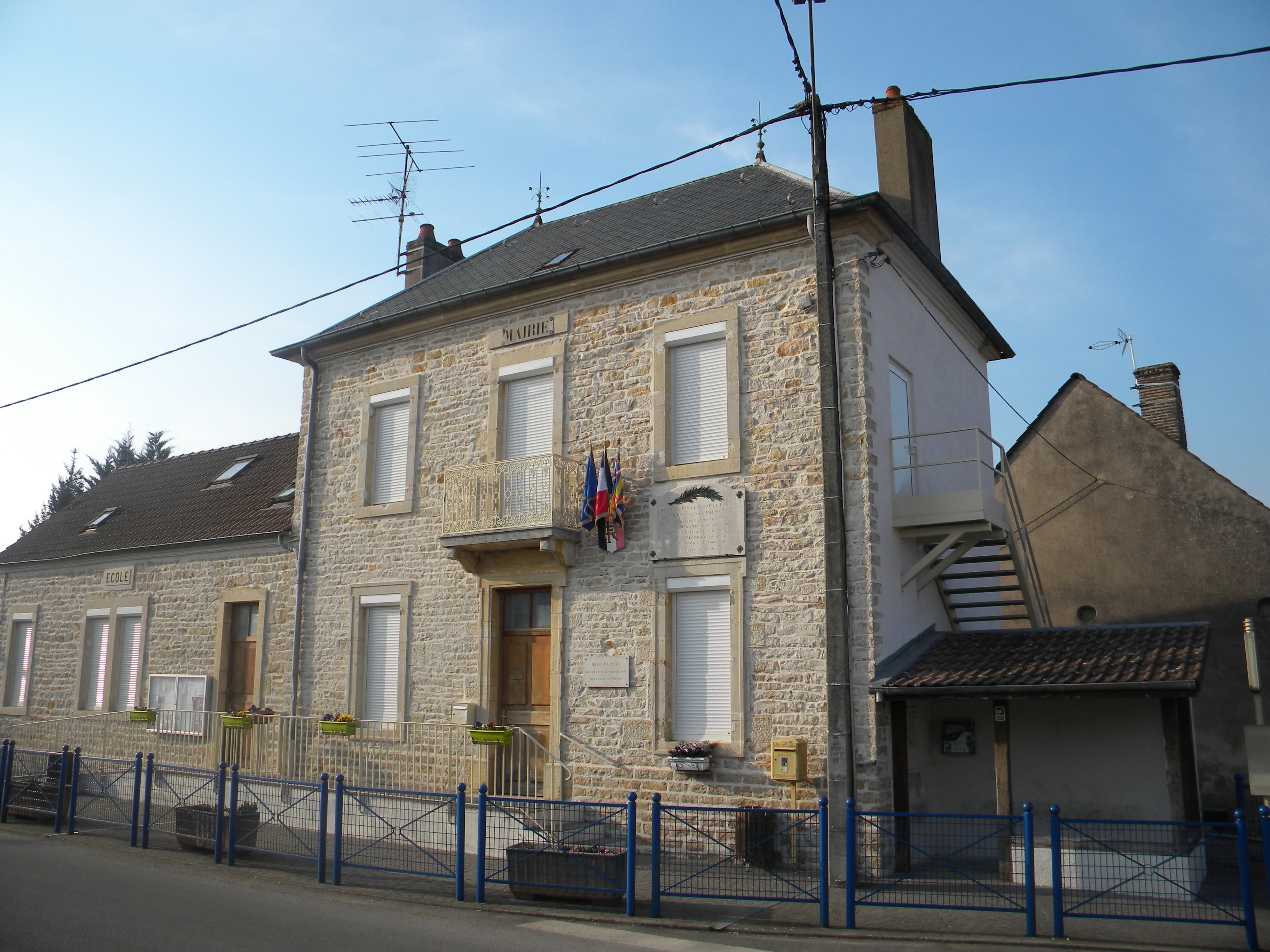 Urbodomo de Beire-le-Fort.